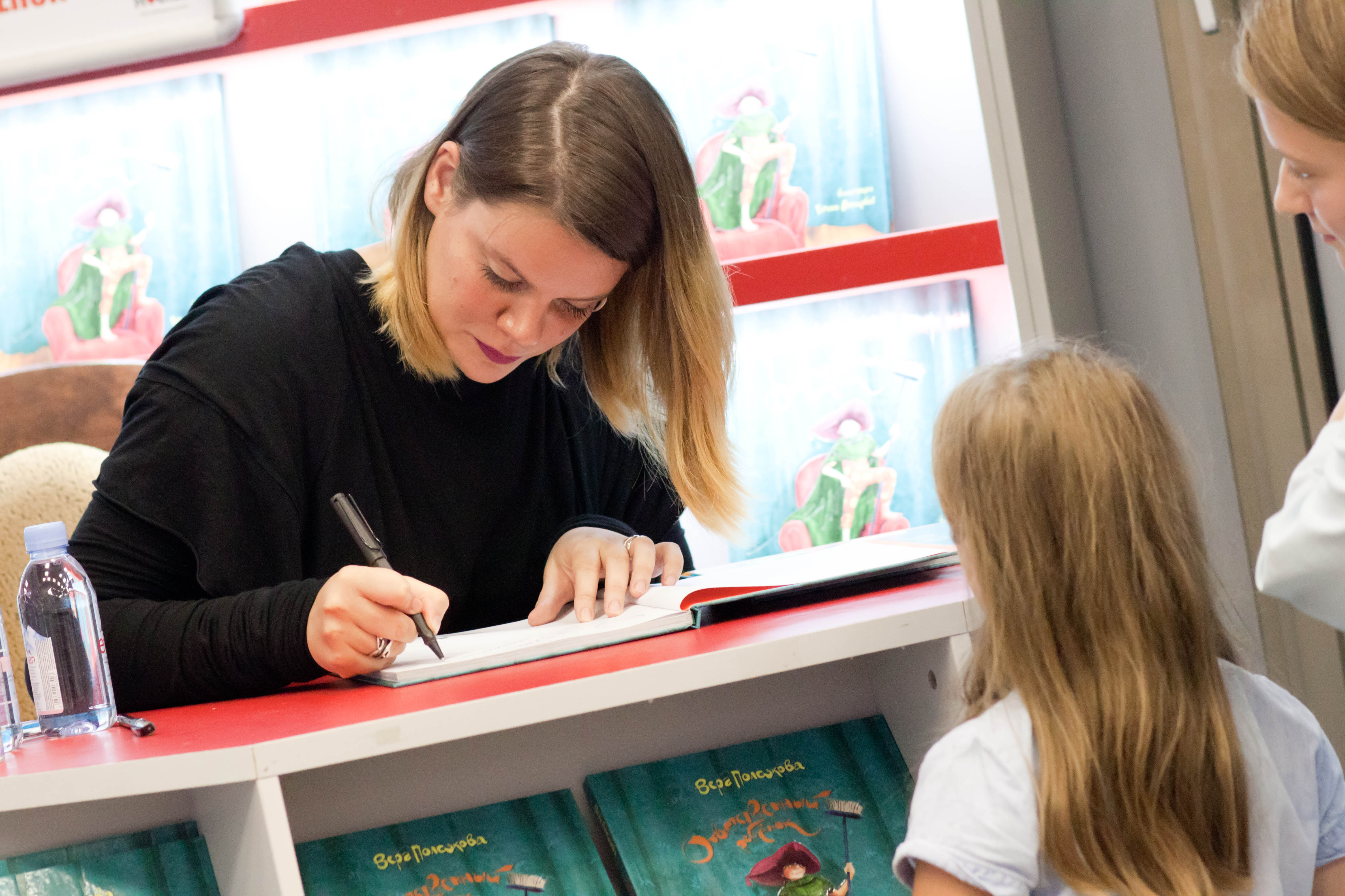 Презентация книги Веры Полозковой "Ответственный ребёнок" в книжном магазине "Москва" на Тверской (Москва)